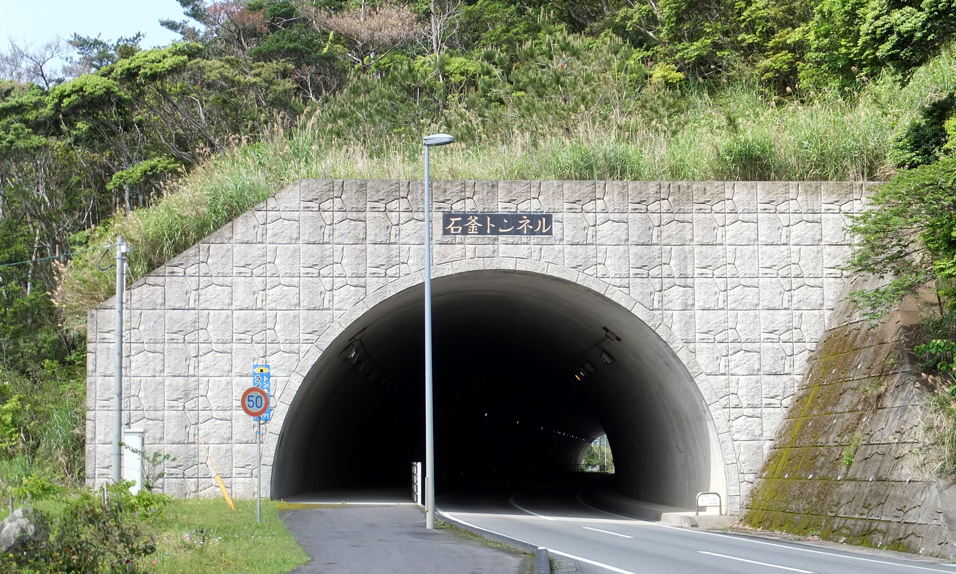 石釜トンネル